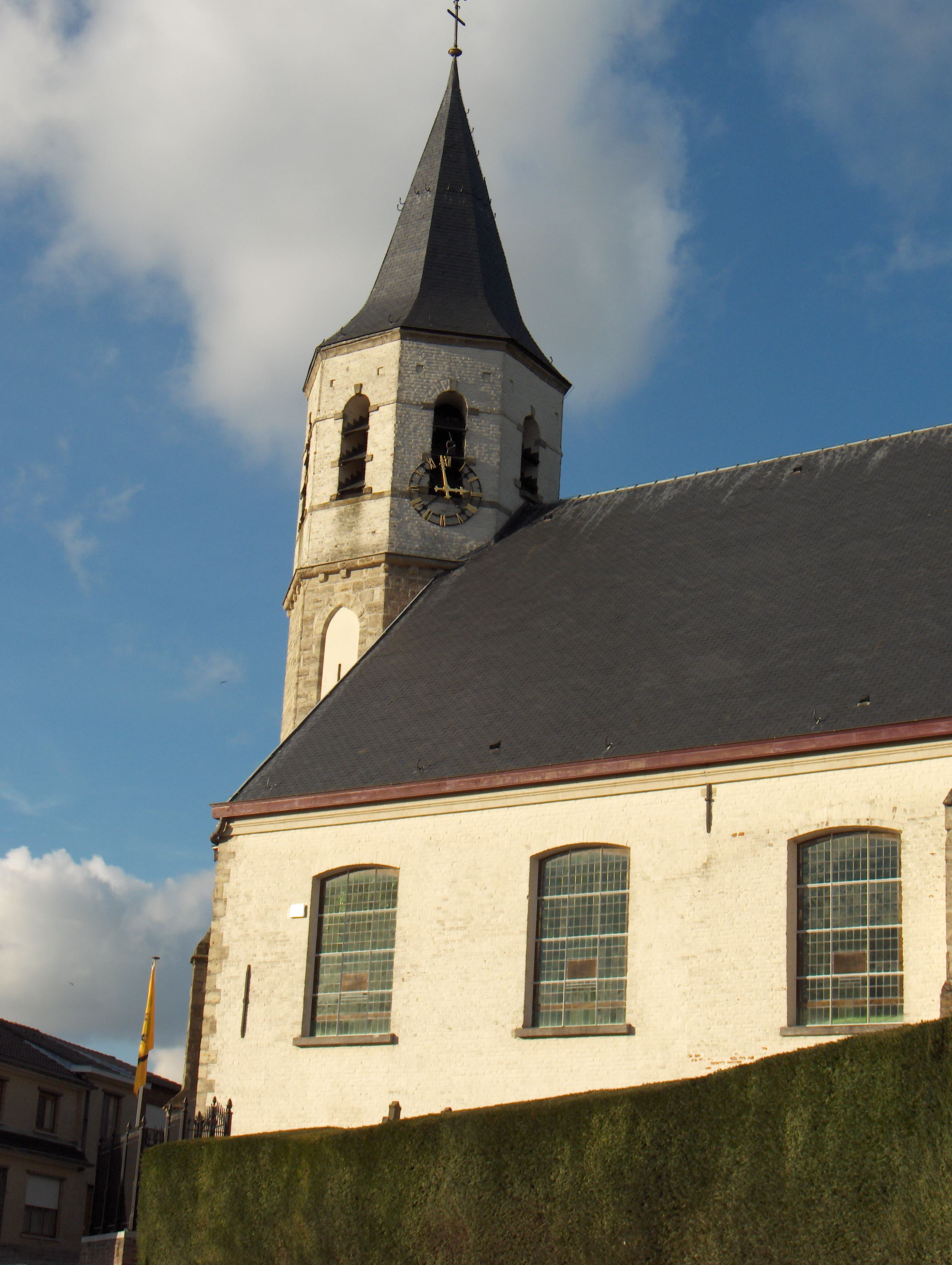 Beschreibung: Gemeinde Herzele (Belgien), Ortsteil Ressegem, Sankt Moritzkirche (Sint-Mauritiuskerk), gotischer Turm, Kirchenschiff aus dem 18. Jh. Datum: 5. November 2005 Fotograf: Friedrich Tellberg